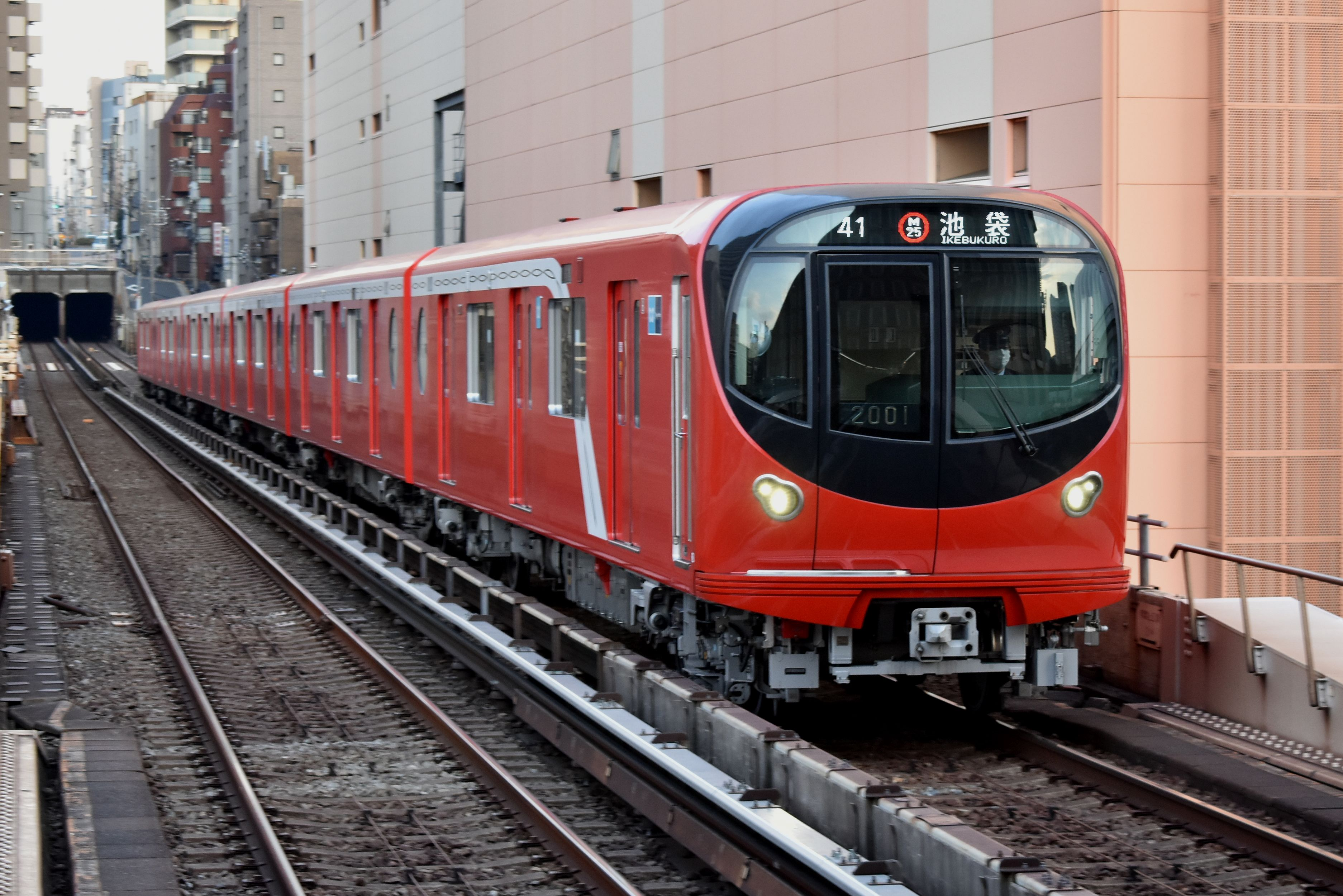 東京メトロ2000系 後楽園駅 Nikon D3400